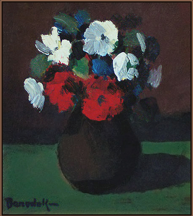 Idősebb Benedek Jenő (Kecskemét, 1906. január 16. – Budapest, 1987. július 19.) magyar festő Virágok című olajfestménye, 1959 - 30x27 cm